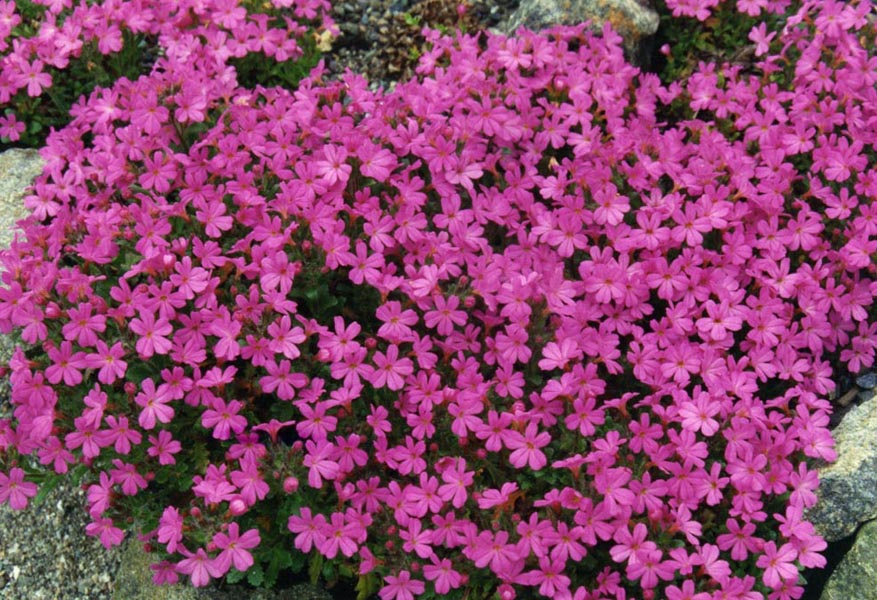 Erinus alpinus 'Dr Haenle'